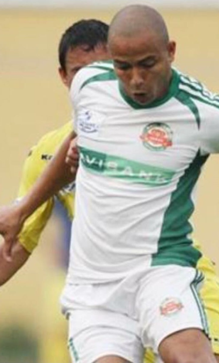 Ricardinho em partida pelo clube onde finalizou a sua carreira, o Navibank Sài Gòn F.C.